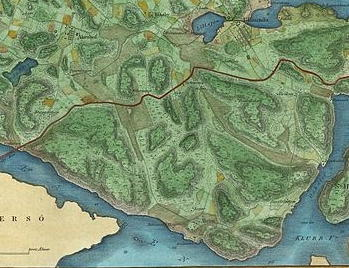 "Karta öfver Bromma Socken uti Stockholms län och Sollentuna härad", detalj. Man brukar kalla den "1829-års karta" över Bromma, uppritad av Kongl. General Landtmäteri Contoret.